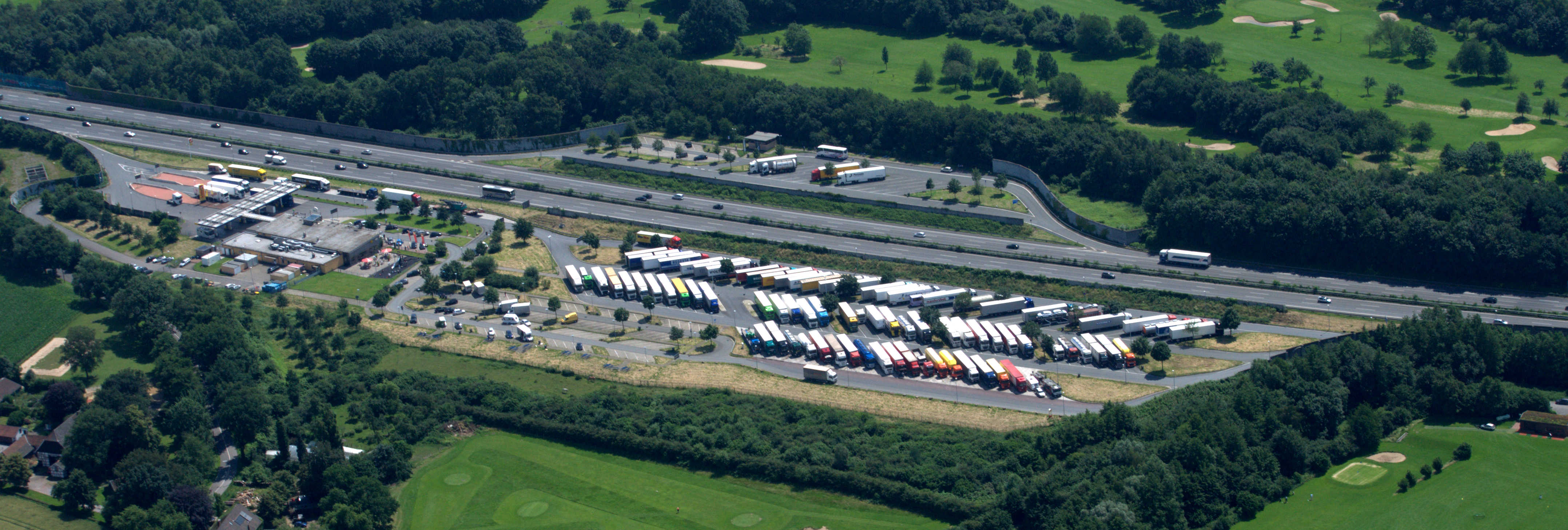 Die Raststätte Resser Mark an der A2 bei Gelsenkirchen